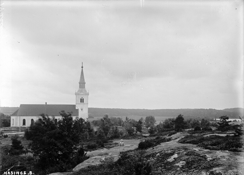 Kyrkan från norr med omgivningar. Snabbinventering.